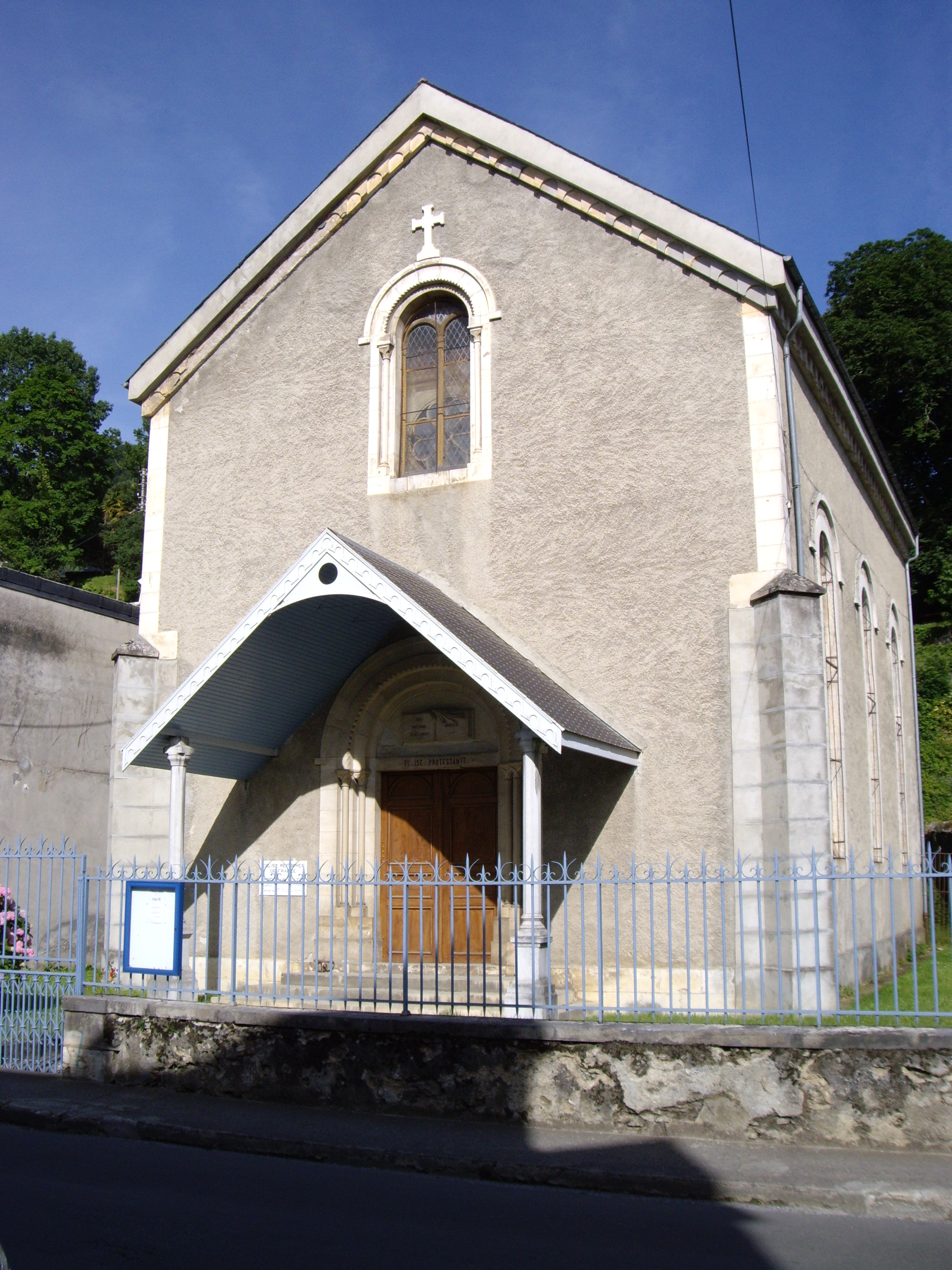 Temple protestant de Bagnères-de-Bigorre (65)